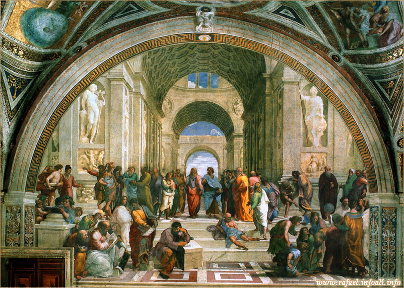 Афинская школа ("Философия") 1509-1511 Фреска Станца делла Сеньятура, кабинет Папы римского